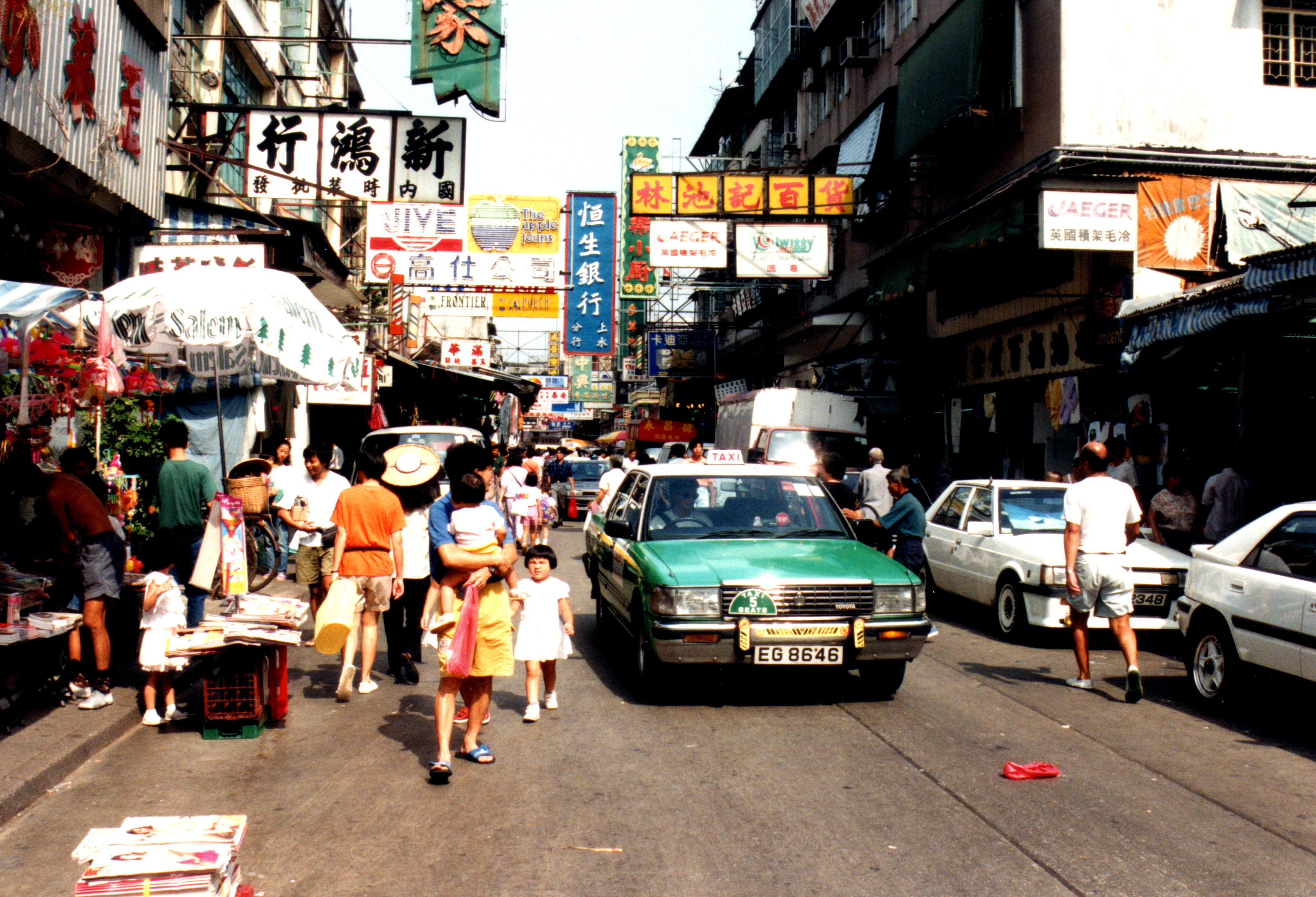 上水 Sheung Shui September 1991